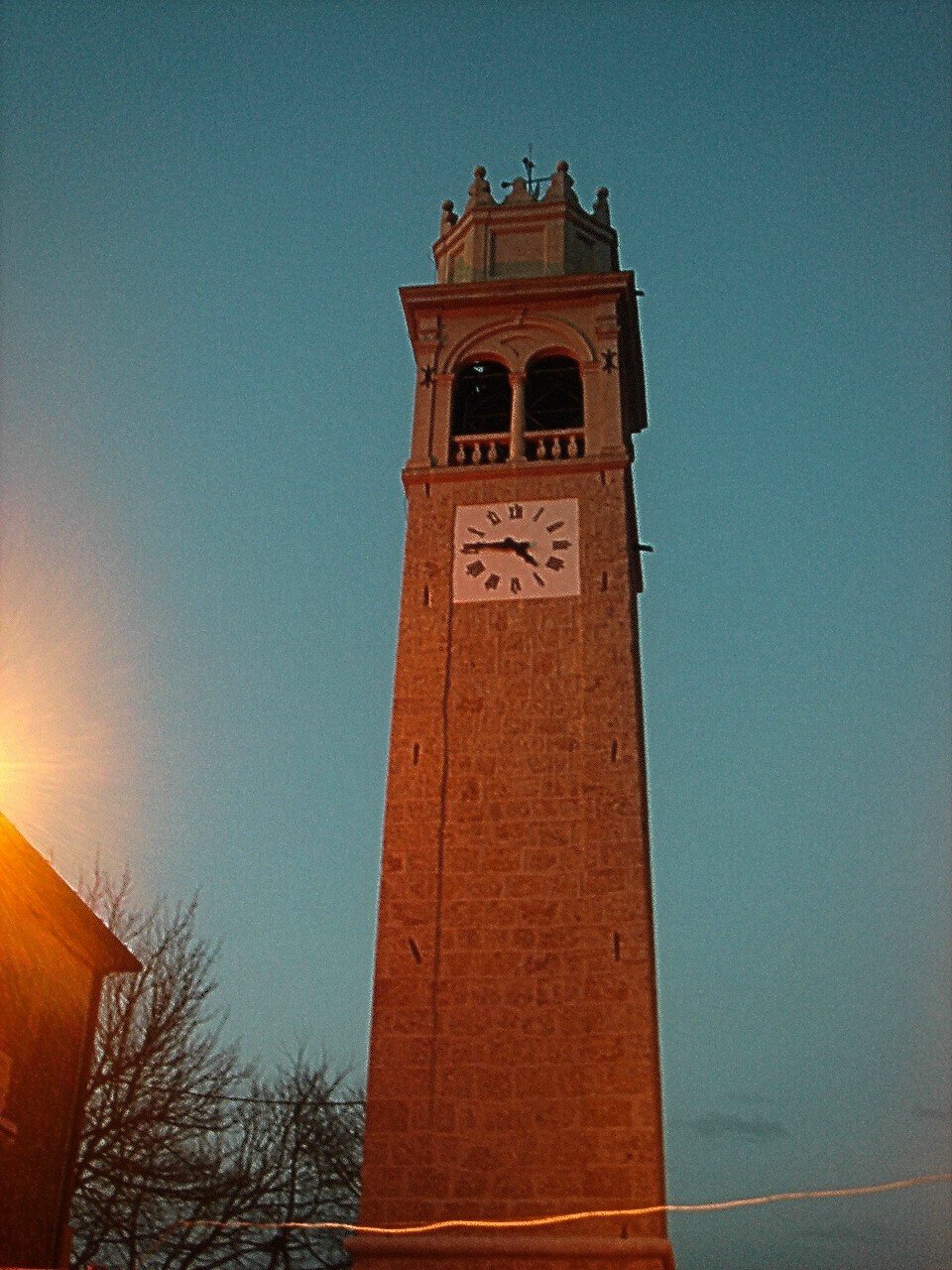 Veduta notturna del campanile di Collabrigo